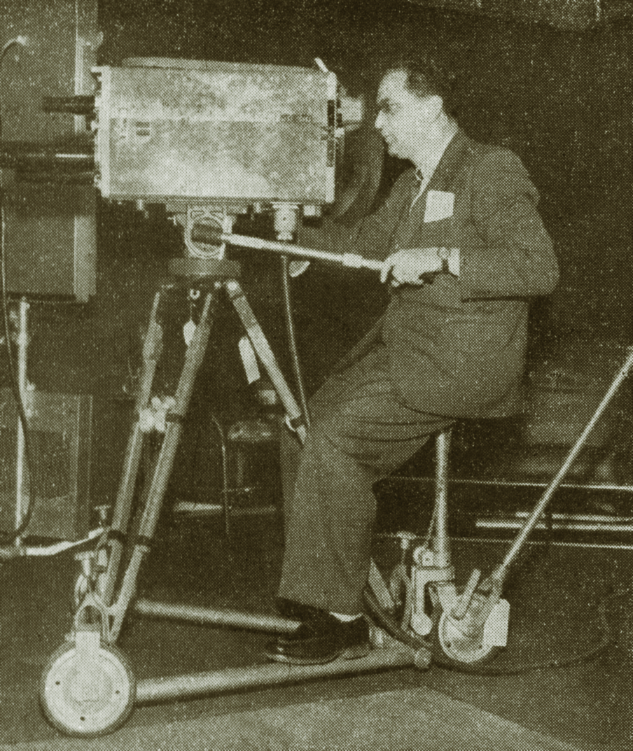 Nicolás Goldberger, fundador do Instituto Monitor